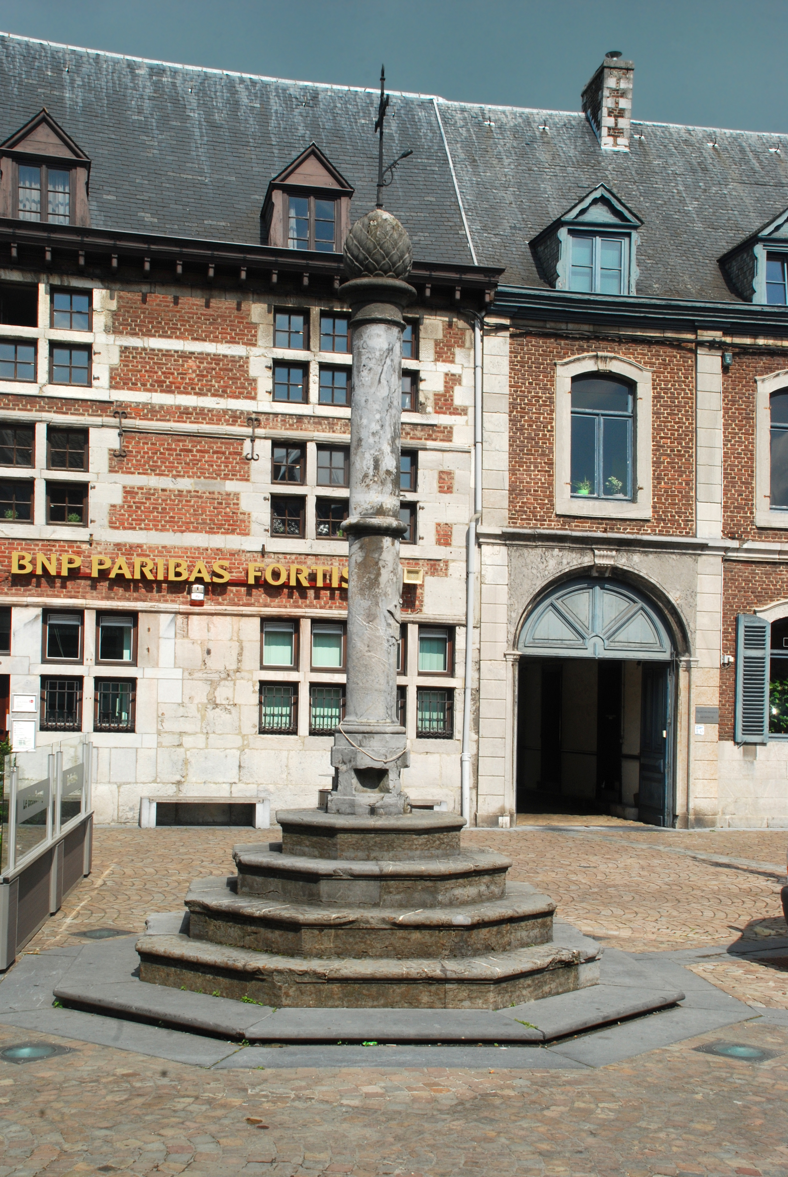 Belgique - Province de Liège - Perron de Theux